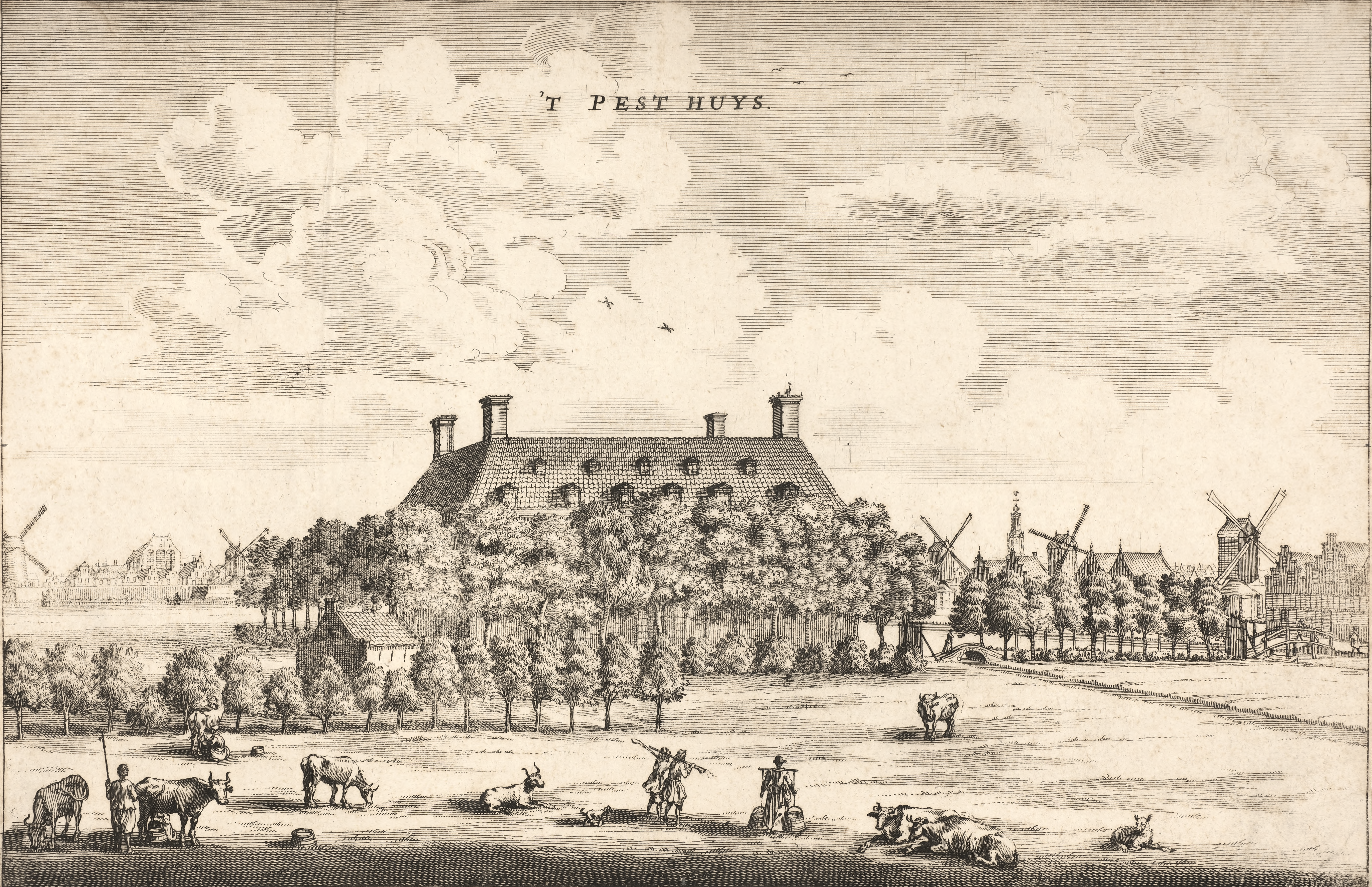 't Pesthuys te Amsterdam. Trefwoorden: prent, ets, gravure, stadsgezicht, stadsgezicht Amsterdam, Buitengasthuis, Overtoom, Tweede Constantijn Huygensstraat. Prentencollectie Amsterdam Museum